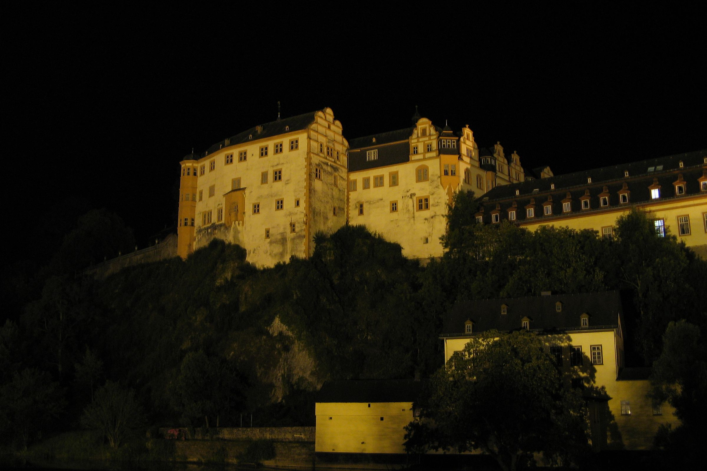 Schloss Weilburg bei Nacht